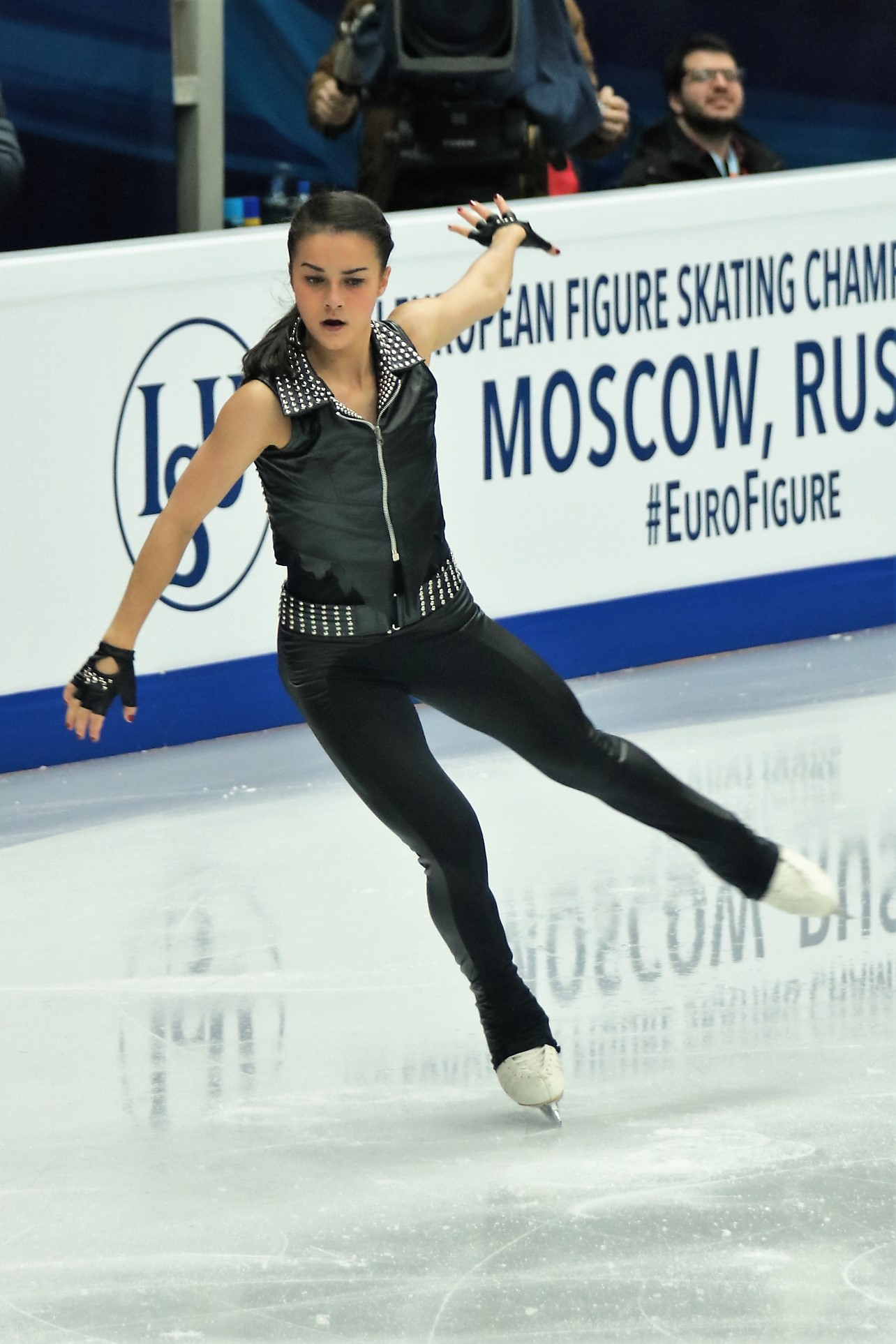 Иветт Тот (Венгрия) на Чемпионате Европы по фигурному катанию 2018.